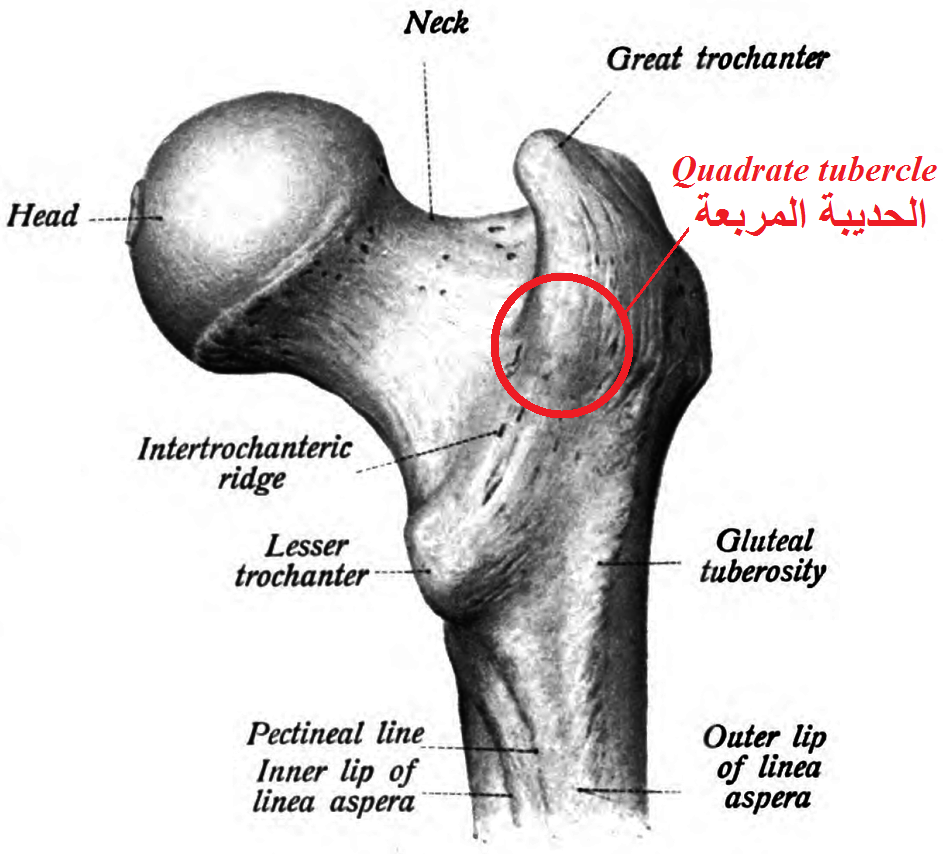 الحديبة المربعة. رأس عظم الفخذ الأيمن ، نظرة من الخلف Upper extremity of right femur. Posterior view. Quadrate tubercle.